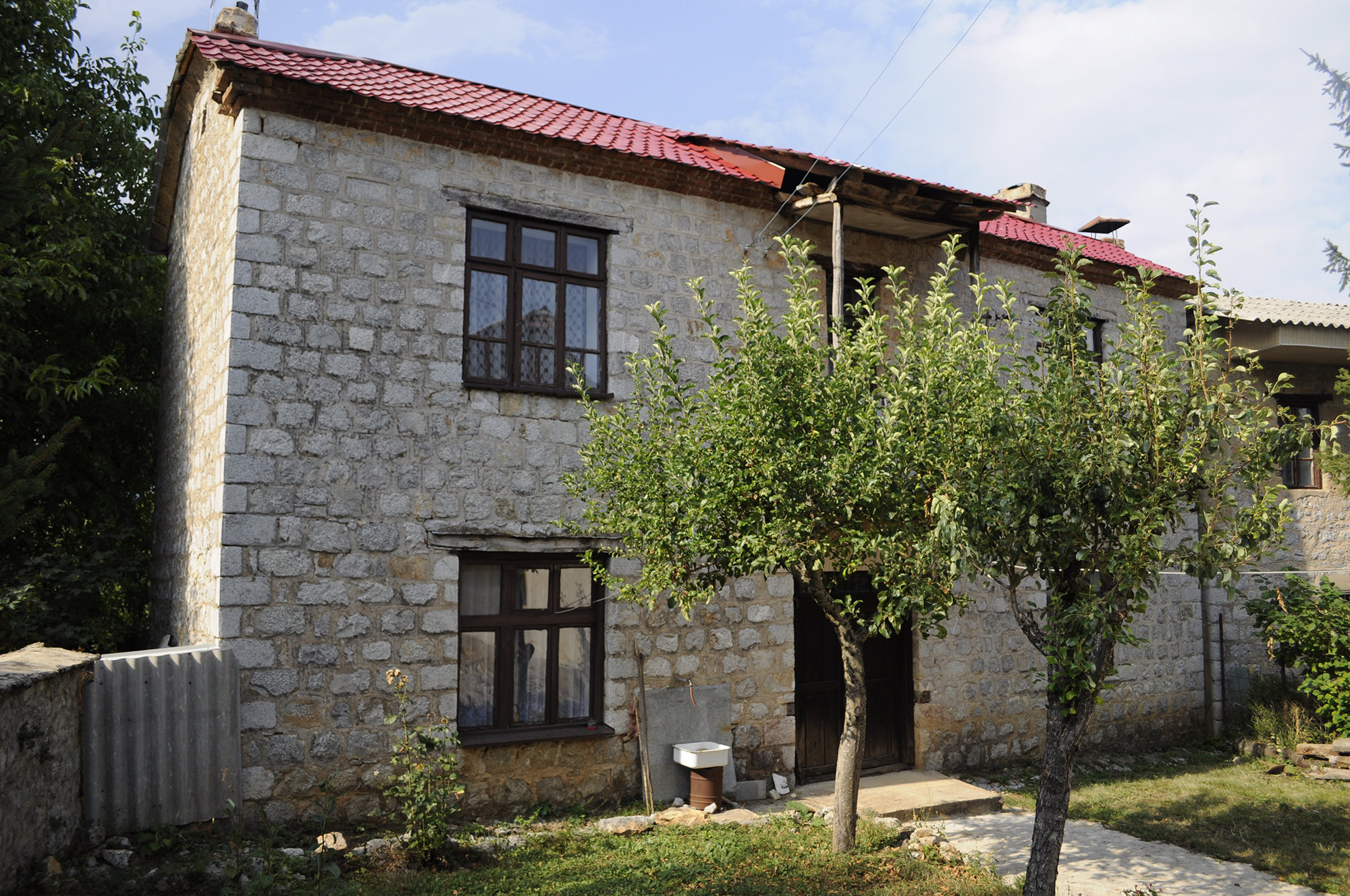 Стара архитектура во Вишни